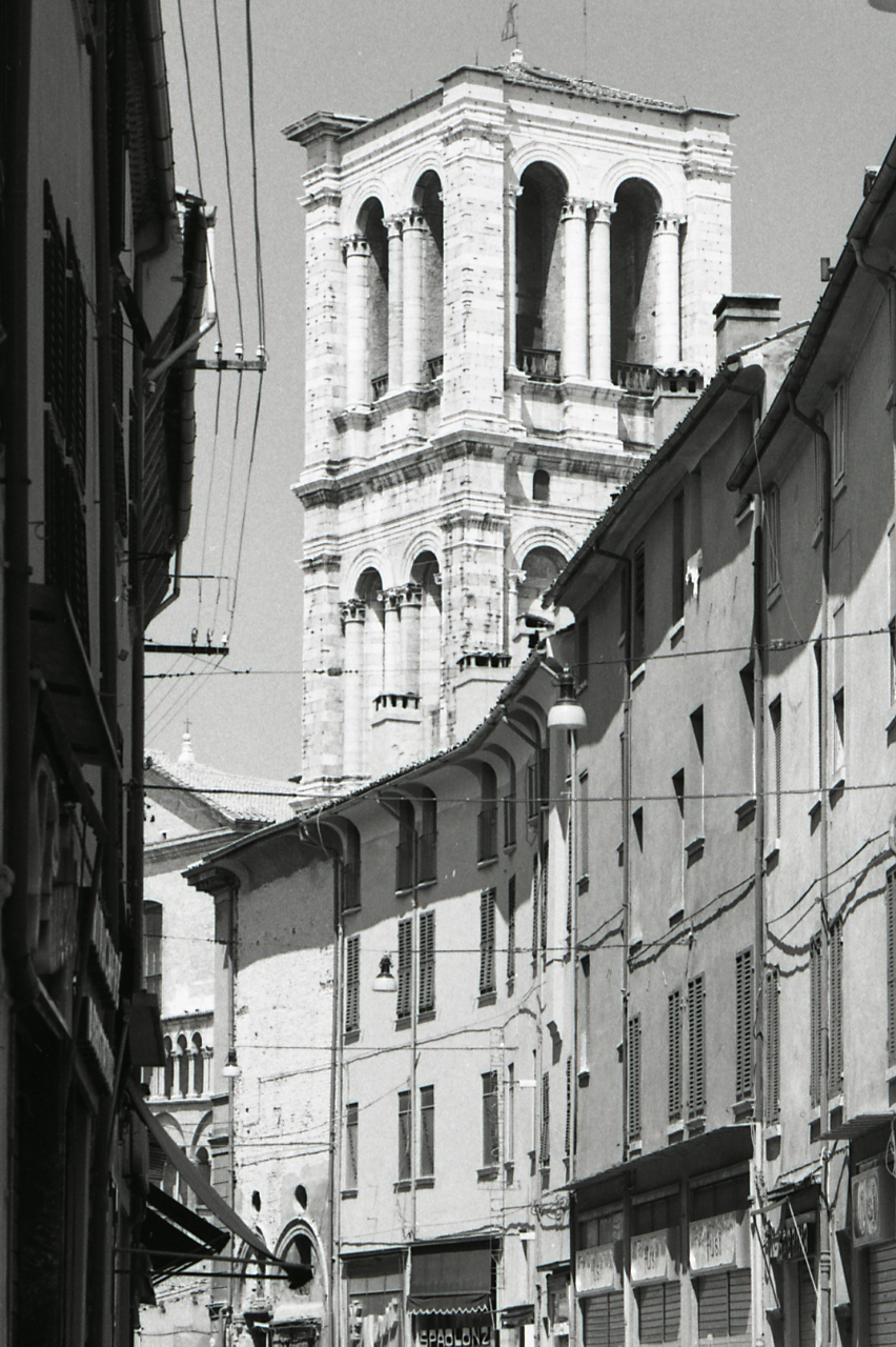 Servizio fotografico : Ferrara, 1974 / Paolo Monti. - Strisce: 7, Fotogrammi complessivi: 37 : Negativo b/n, gelatina bromuro d'argento/ pellicola ; 35 mm. - ((Sul portanegativi: N[I]K[MA]T FP4. - (1?):. - 9-14 = via Mazzini. - Occasione: Documentazione del centro storico. - Fonte: Agenda di Paolo Monti: Leica 1501-3000 Controllo numerazione (1950-1978), presso Archivio Paolo Monti. - Fonte: Fattura di Paolo Monti: IV. Commesse/ Fattura n. 18/ Riprese fotografiche del centro storico (Mostra Vitalità del centro storico) (1974/10/16), presso Archivio Paolo Monti